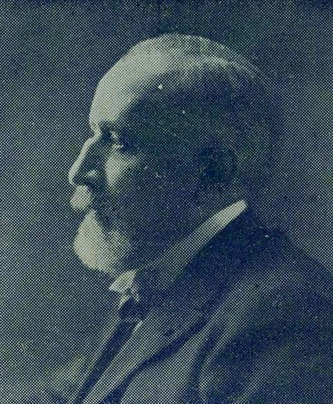 Monsieur Octave Homberg